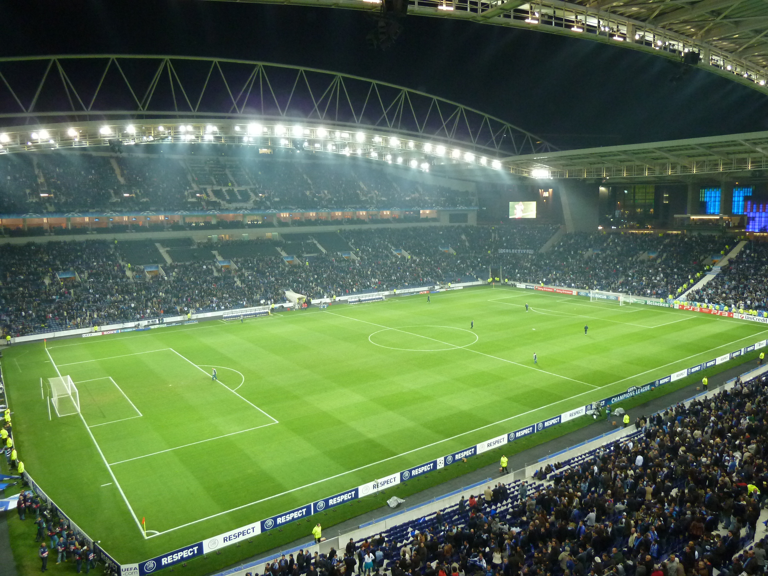 No meio tempo do jogo em que o FC Porto foi eliminado da Champions League 2011-2012.